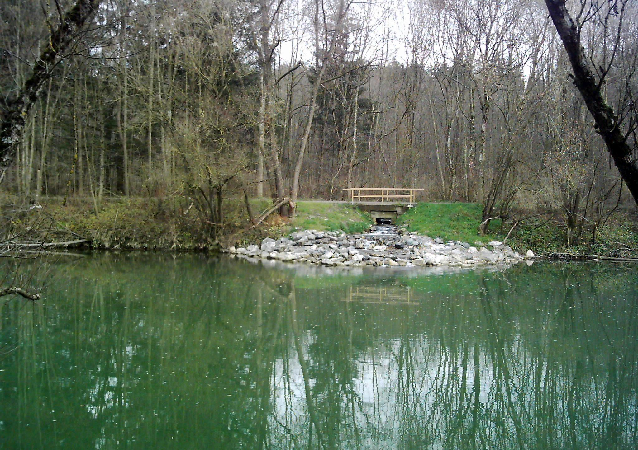 Iller zwischen Mooshausen und Buxheim. Zufluß eines rechten Baches in die Iller